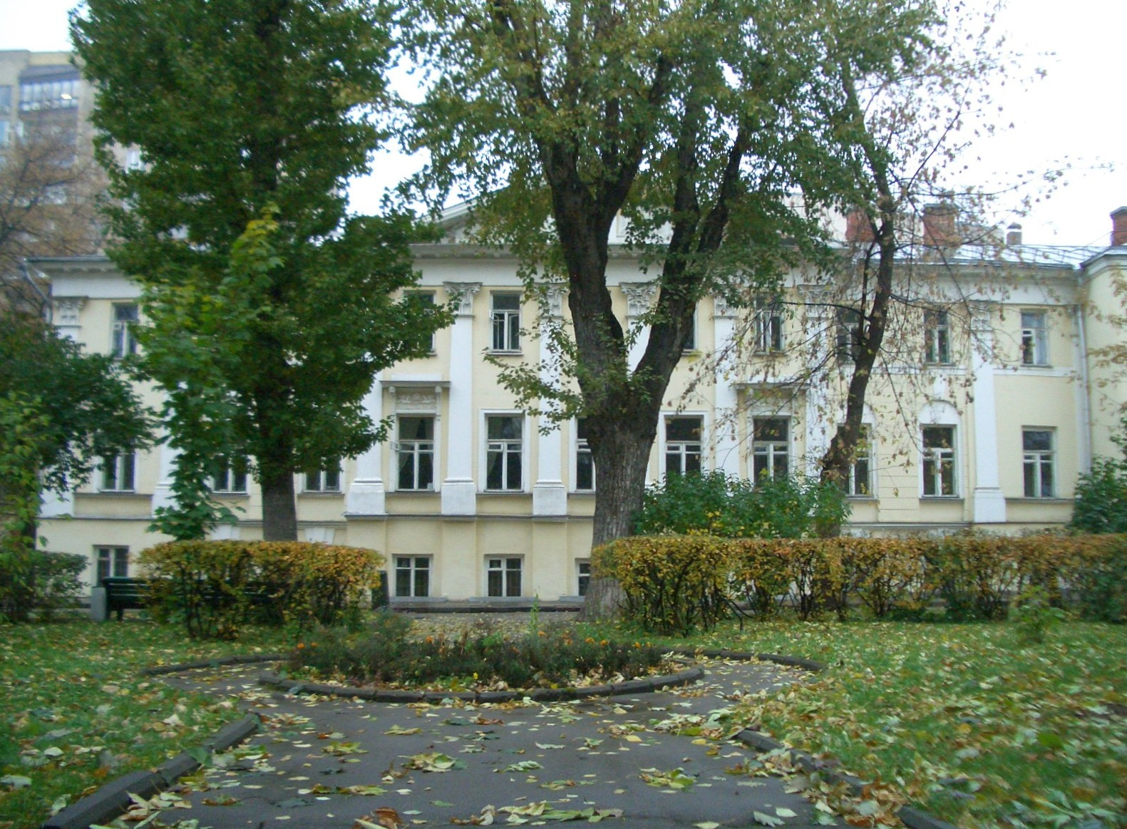 Beschreibung: Geburtshaus von Alexander Herzen in Moskau, heute Sitz des Gorki-Literaturinstituts, Adresse: Moskau, Tverskoj Boulevard 25, aufgenommen im Oktober 2006 Дом Герцена, Октябрь 2006 Autor: Lewa